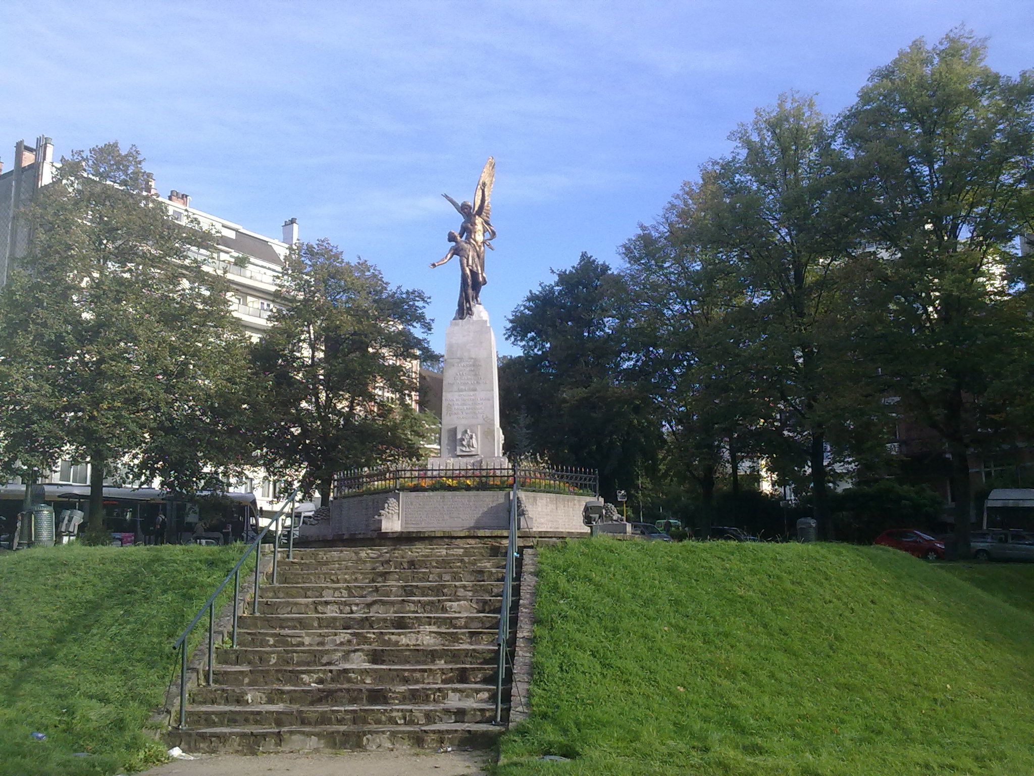 Le monument aux Morts 14-18 au centre du Square des Héros à Uccle (1180 Bruxelles) carrefour av Brugmann et Avenue De Fré.